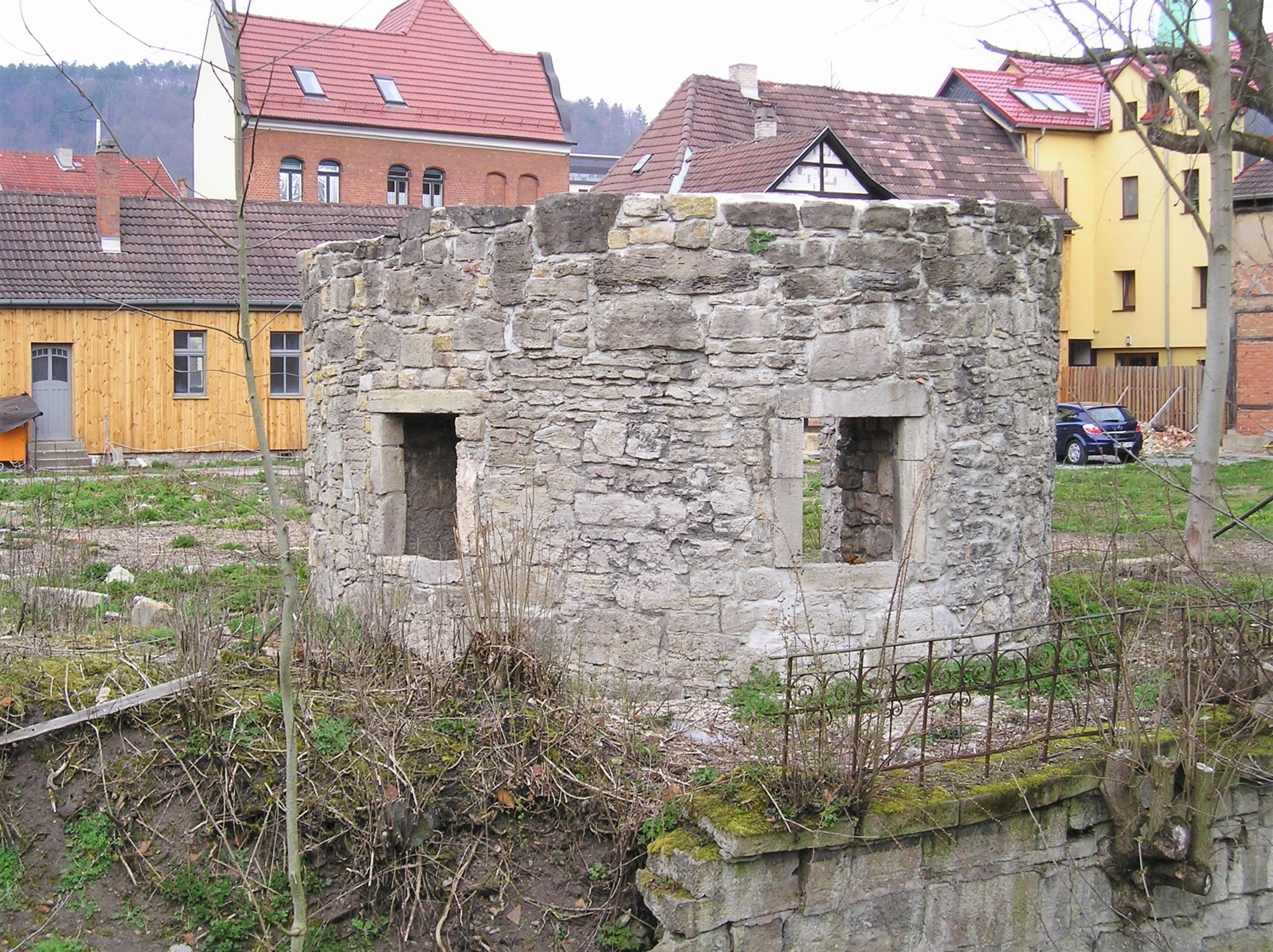 Denkmalgeschützter Rest eines Schalenturms der einstigen Meininger Stadtbefestigung, 2009 restauriert.